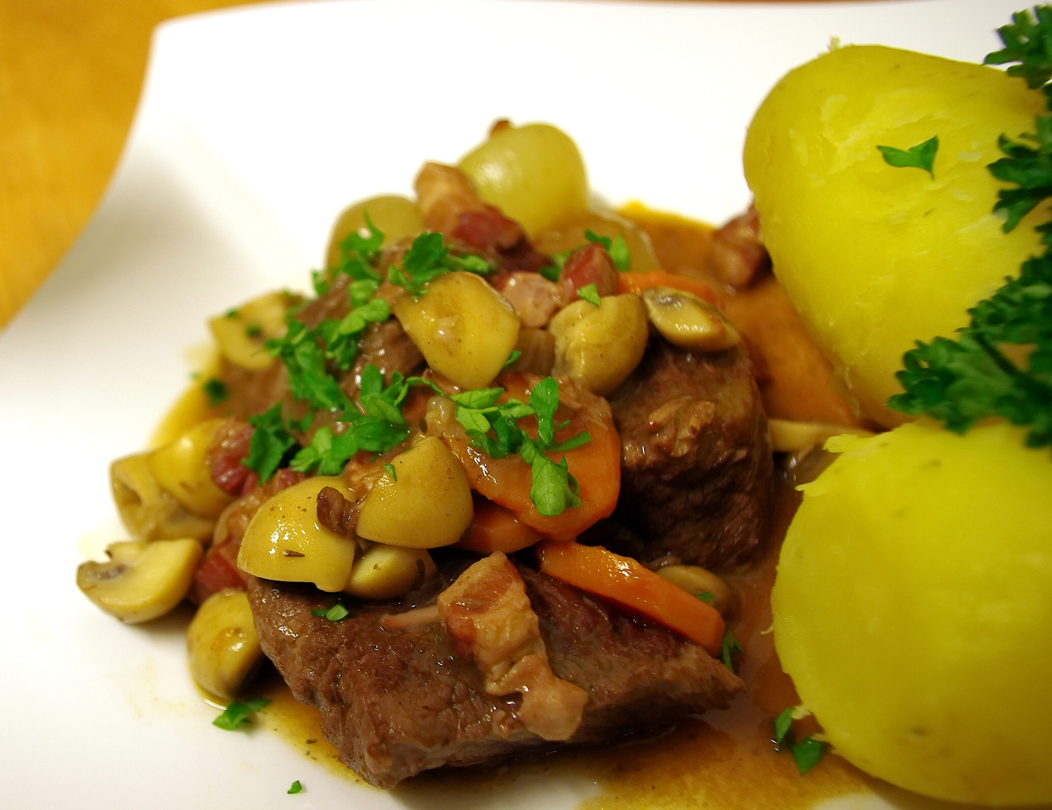 Bœuf bourguignon mit Salzkartoffeln